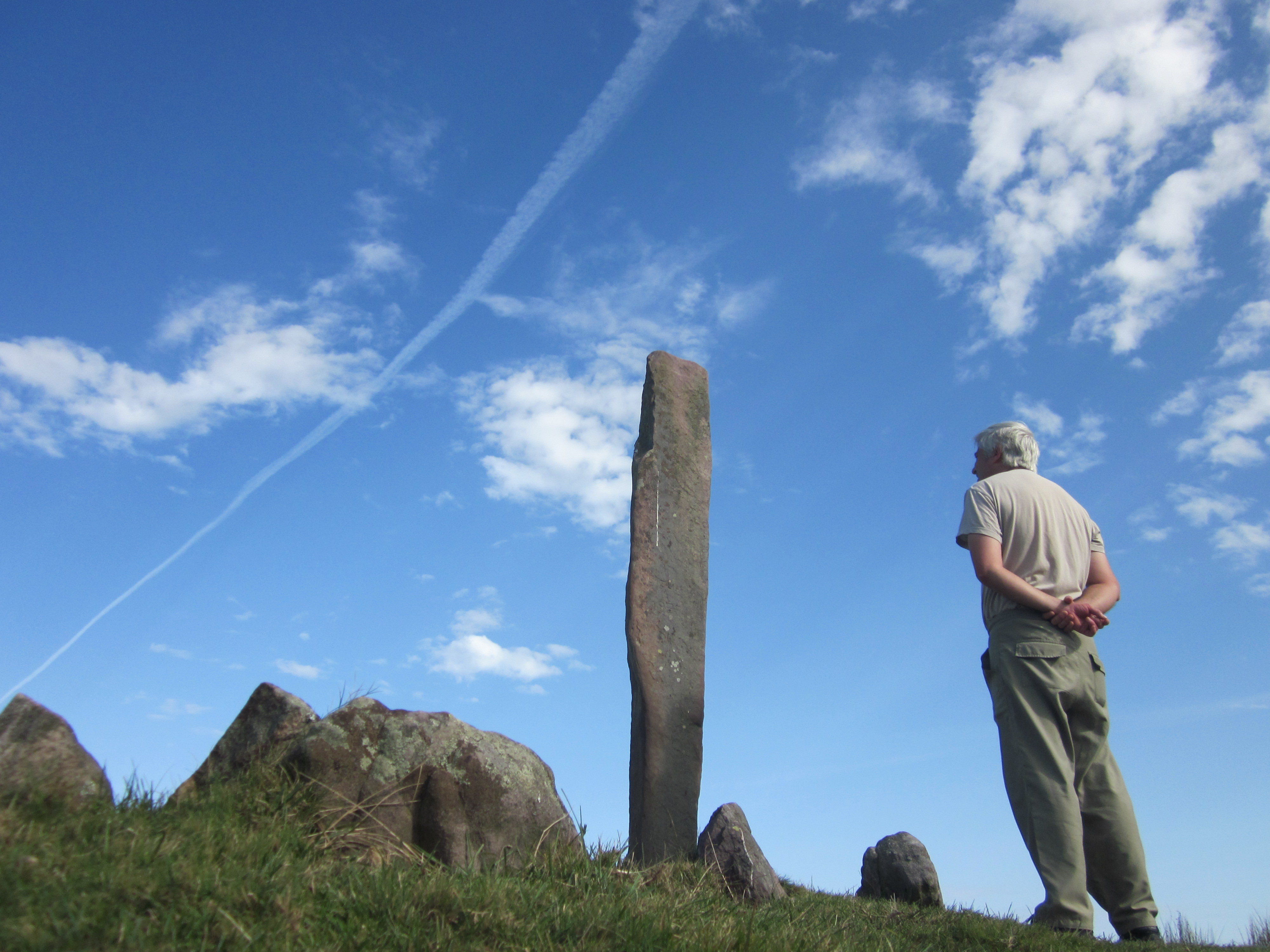 Menhir d´hauteur à Eteneta.